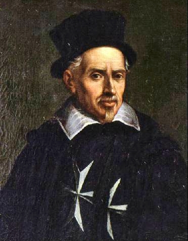 Ritratto di autore anonimo di Giovanni Paolo Lascaris, conservato presso il Castello di Masino, Sala dei Savoia (Italy) - XVII sec.